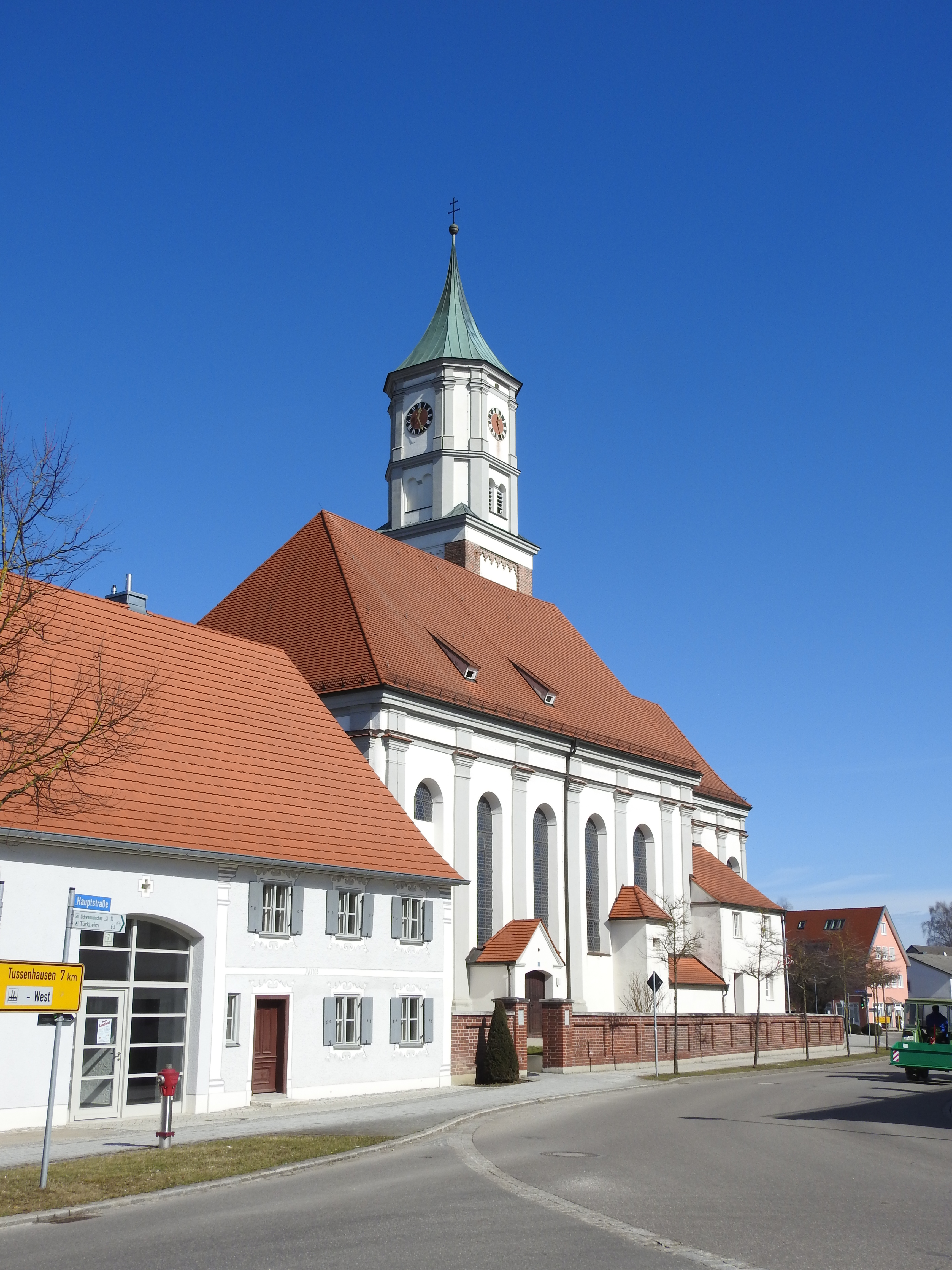 Pfarrkirche in Ettringen von Südwesten